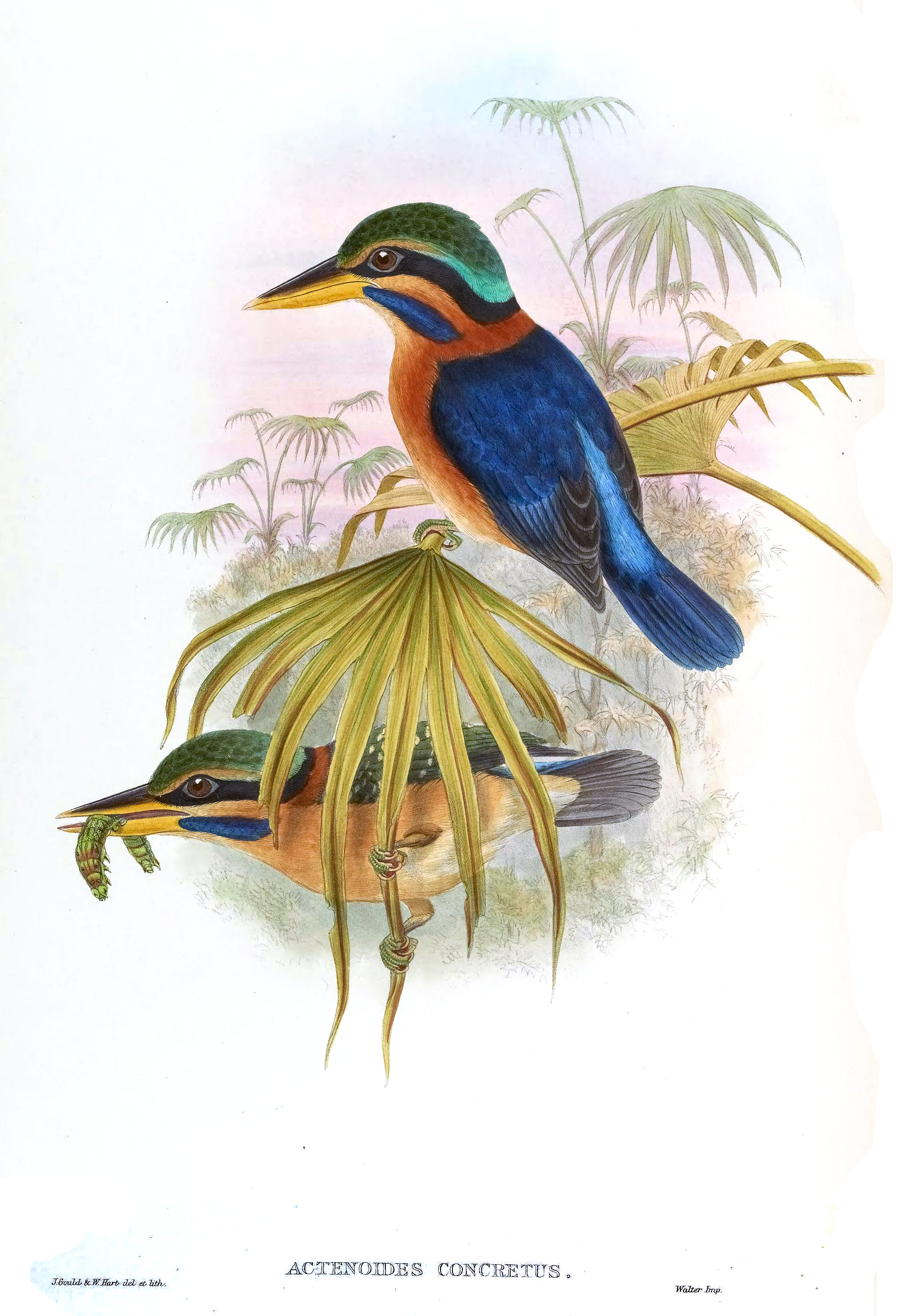 Actenoides concretus